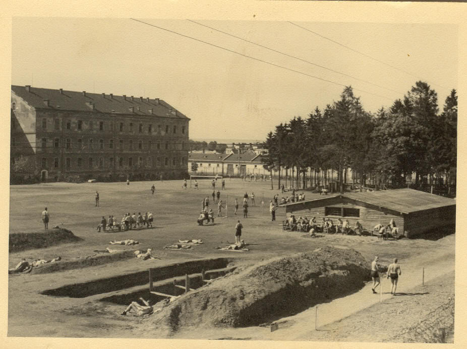 Листівка